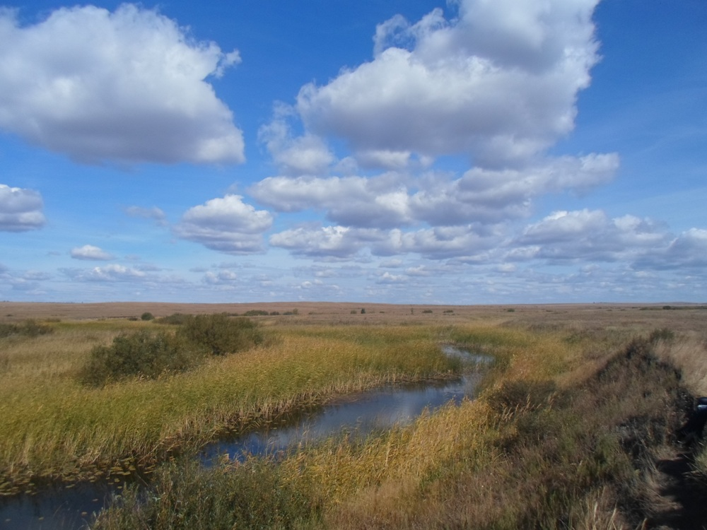 Аркаим, Брединский район This image is related to the protected area of Russia number 7410044